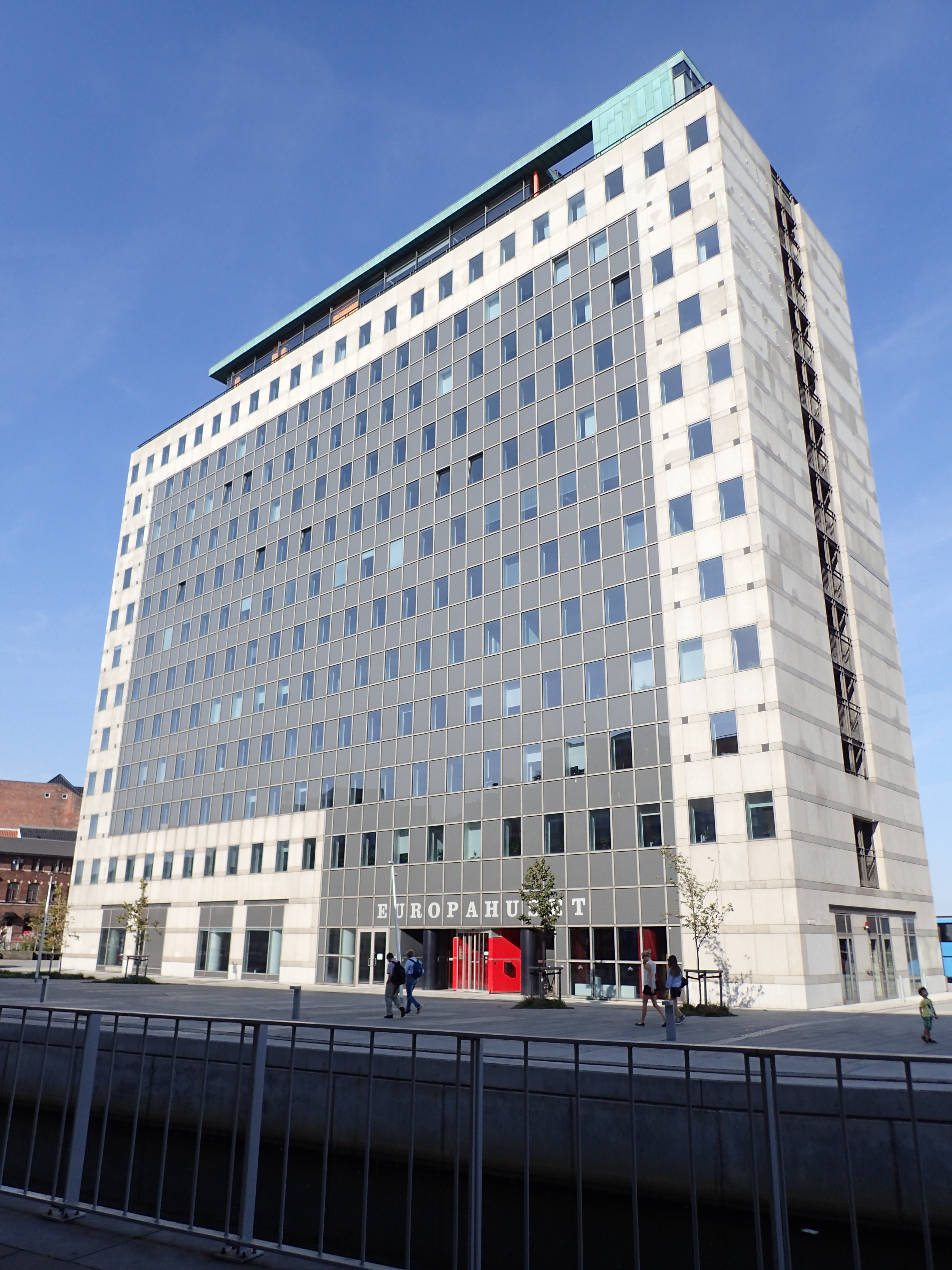 Europahuset